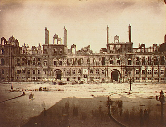 Den Hôtel de Ville zu Paräis nom Brand vun 1871.